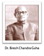 বীরেশচন্দ্র গুহ